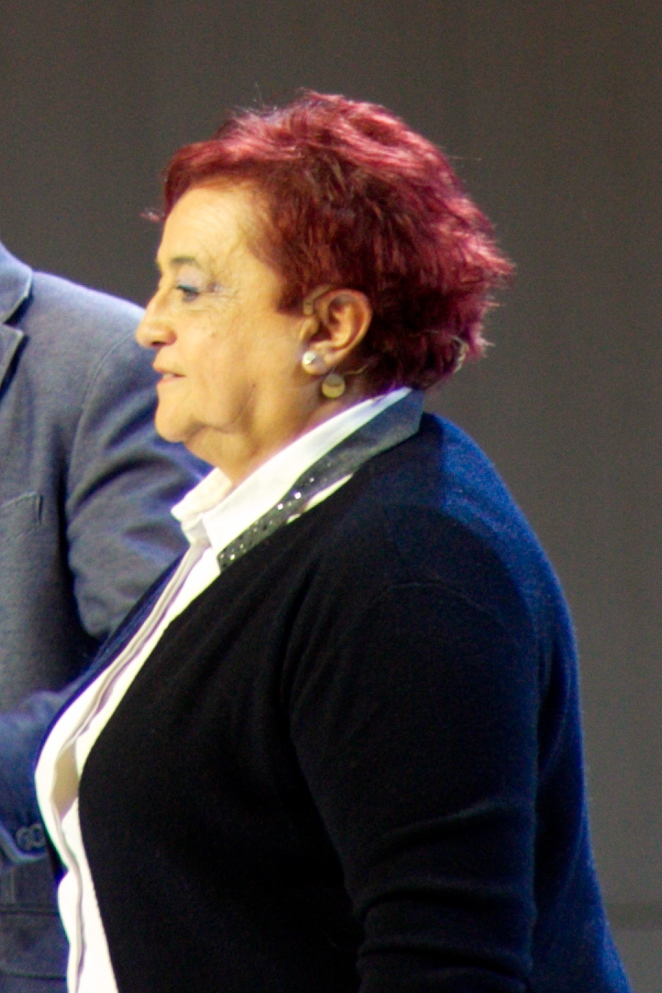 Ana Surra a l'Acte d'ERC pro-referèndum. Barcelona 4-3-2017